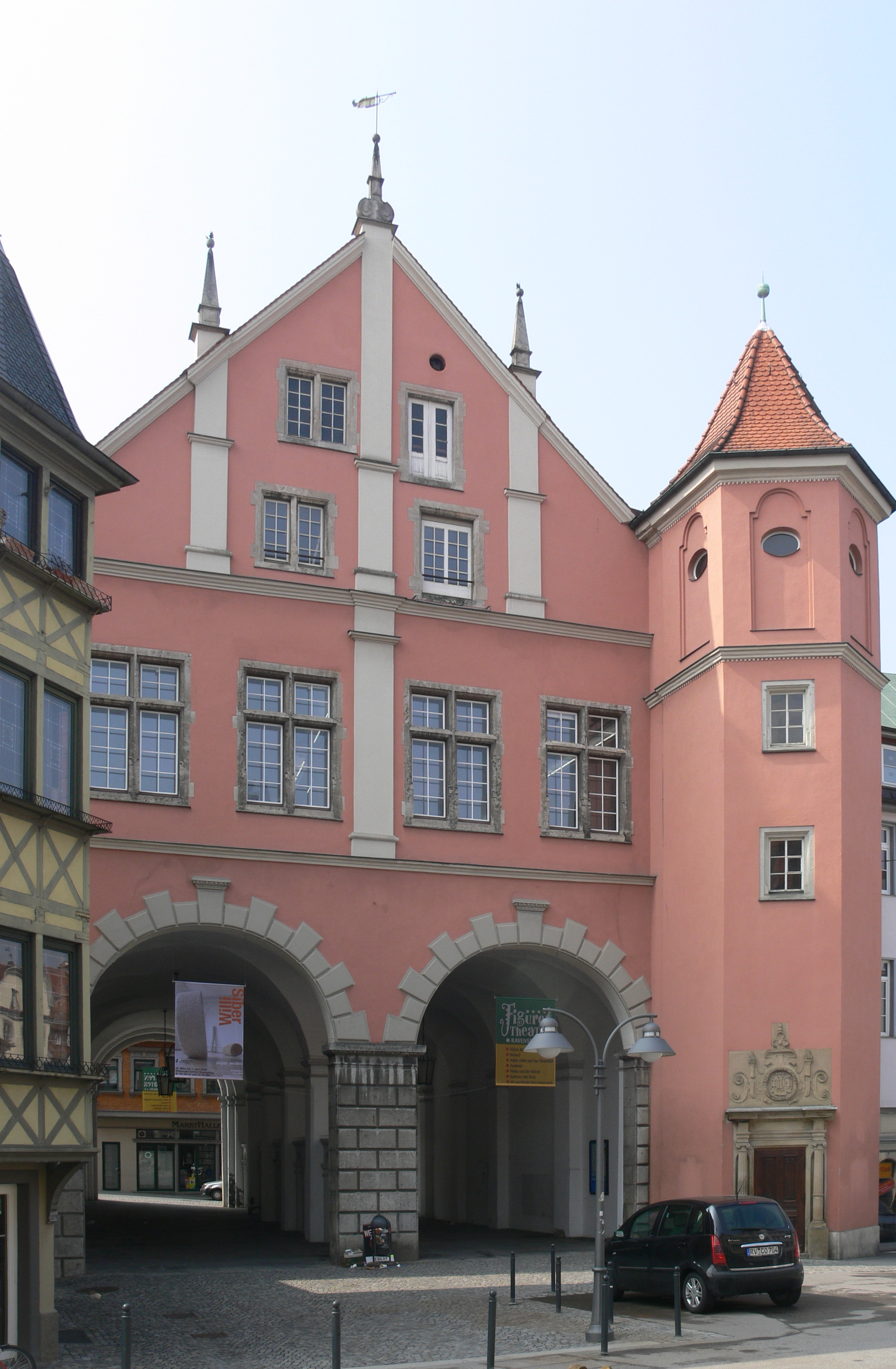 Ravensburg, Altes Theater (Brotlaube) Fassade zum Gepsinstmarkt